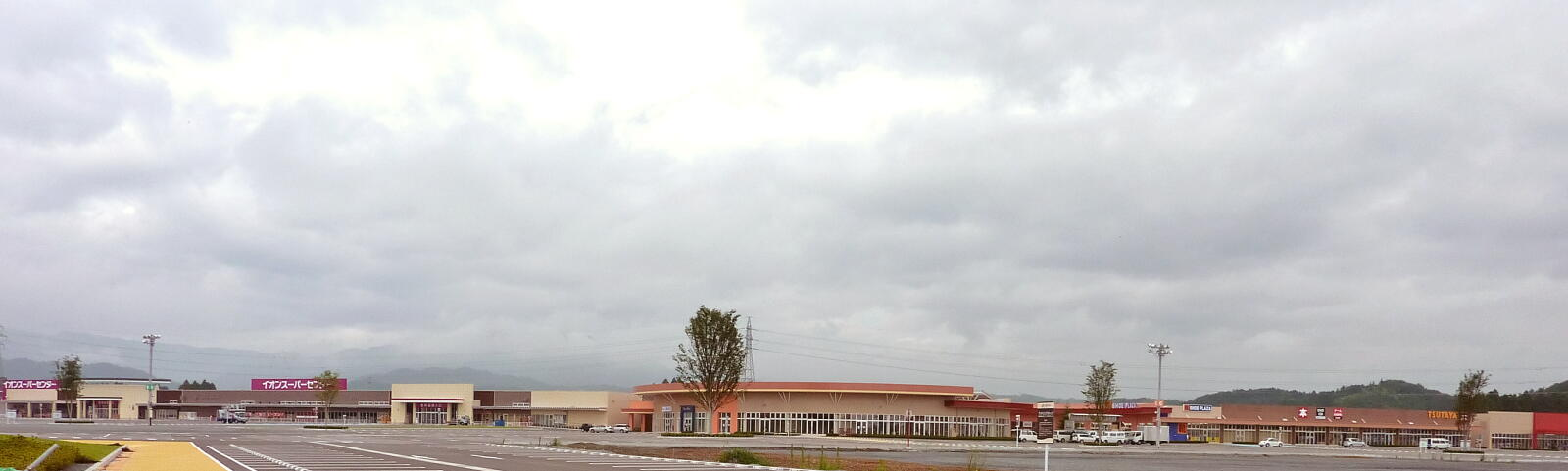 南相馬ジャスモール